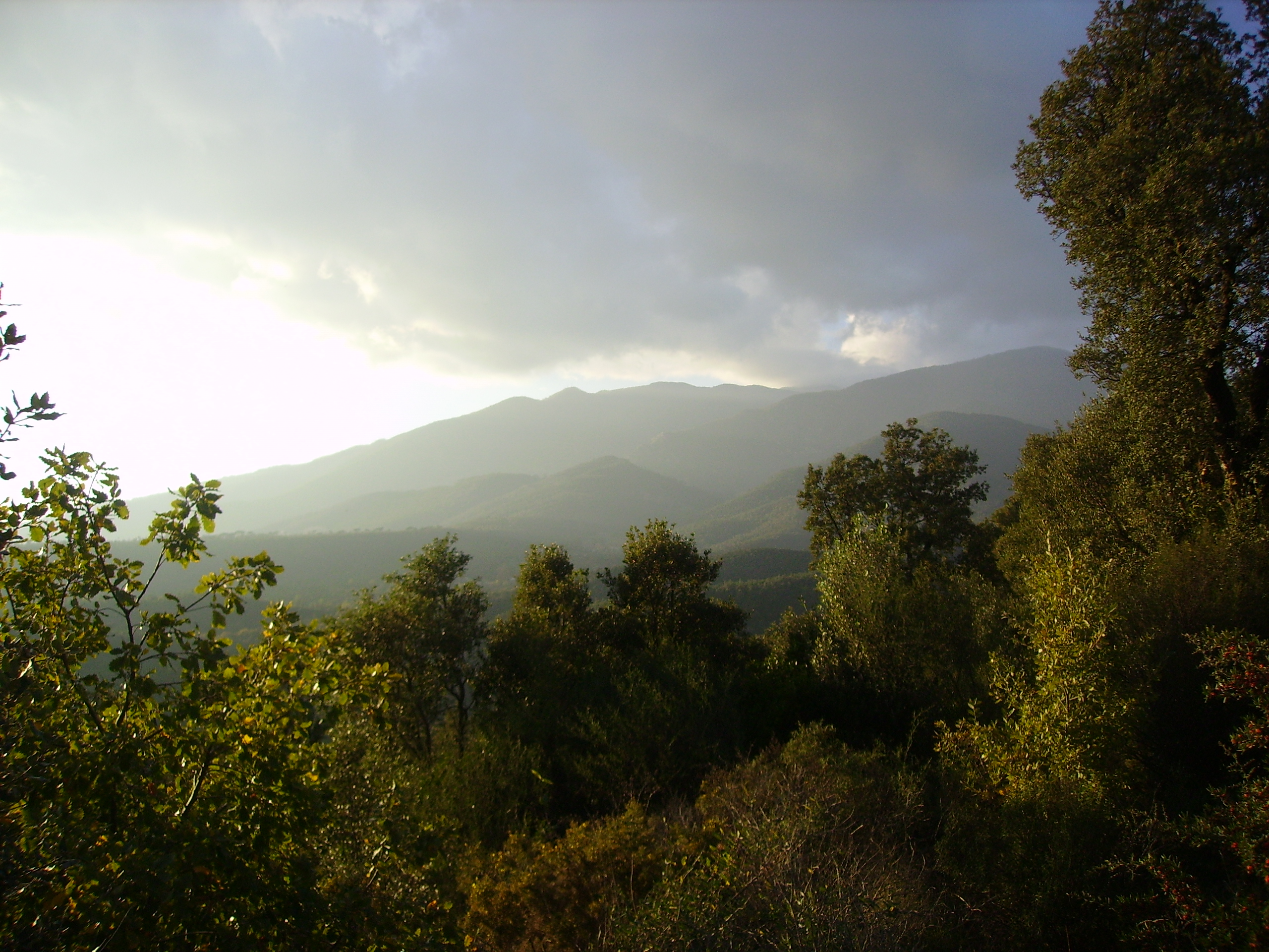 El Montseny.